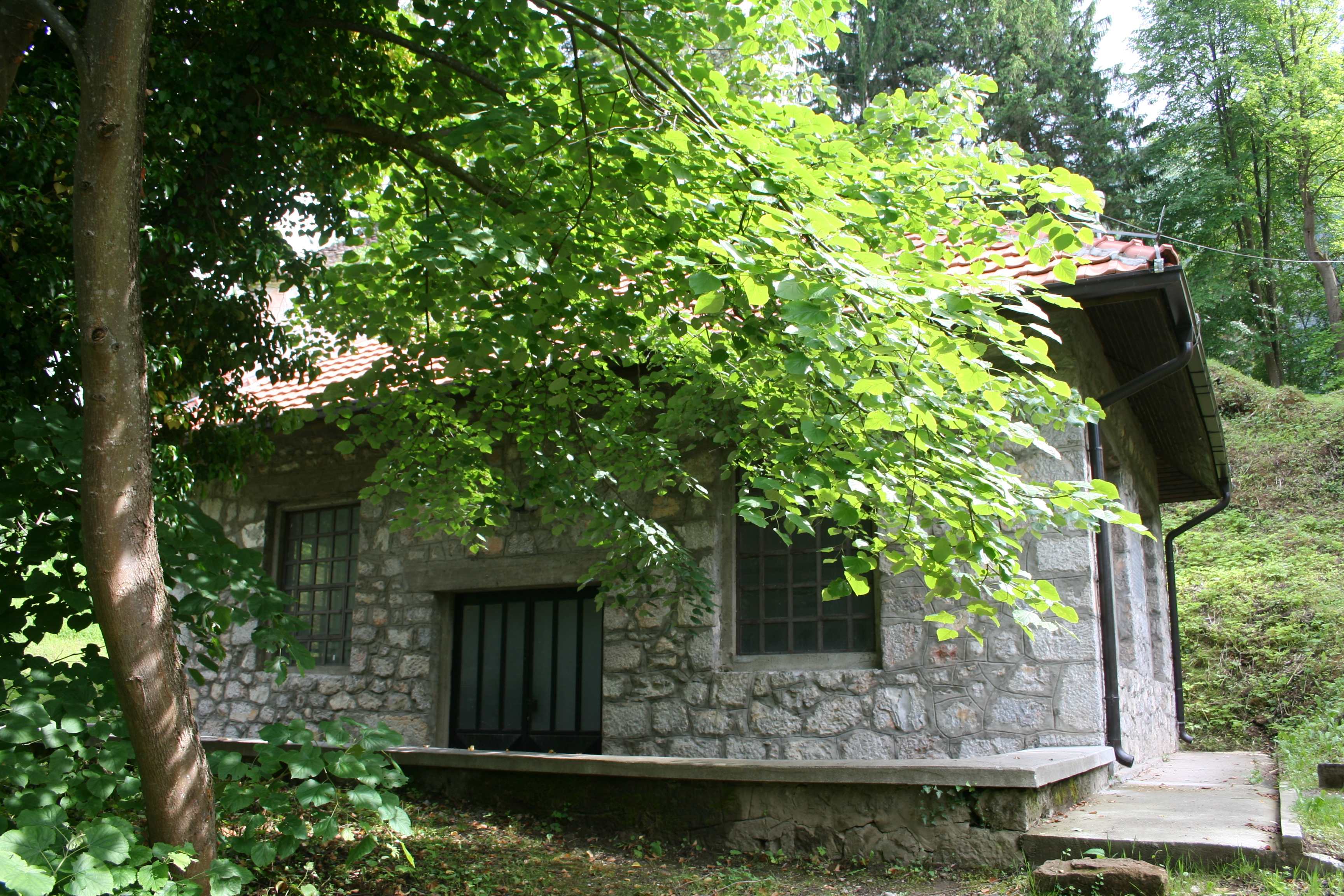 Stara elektrana Vrelo, Perućac